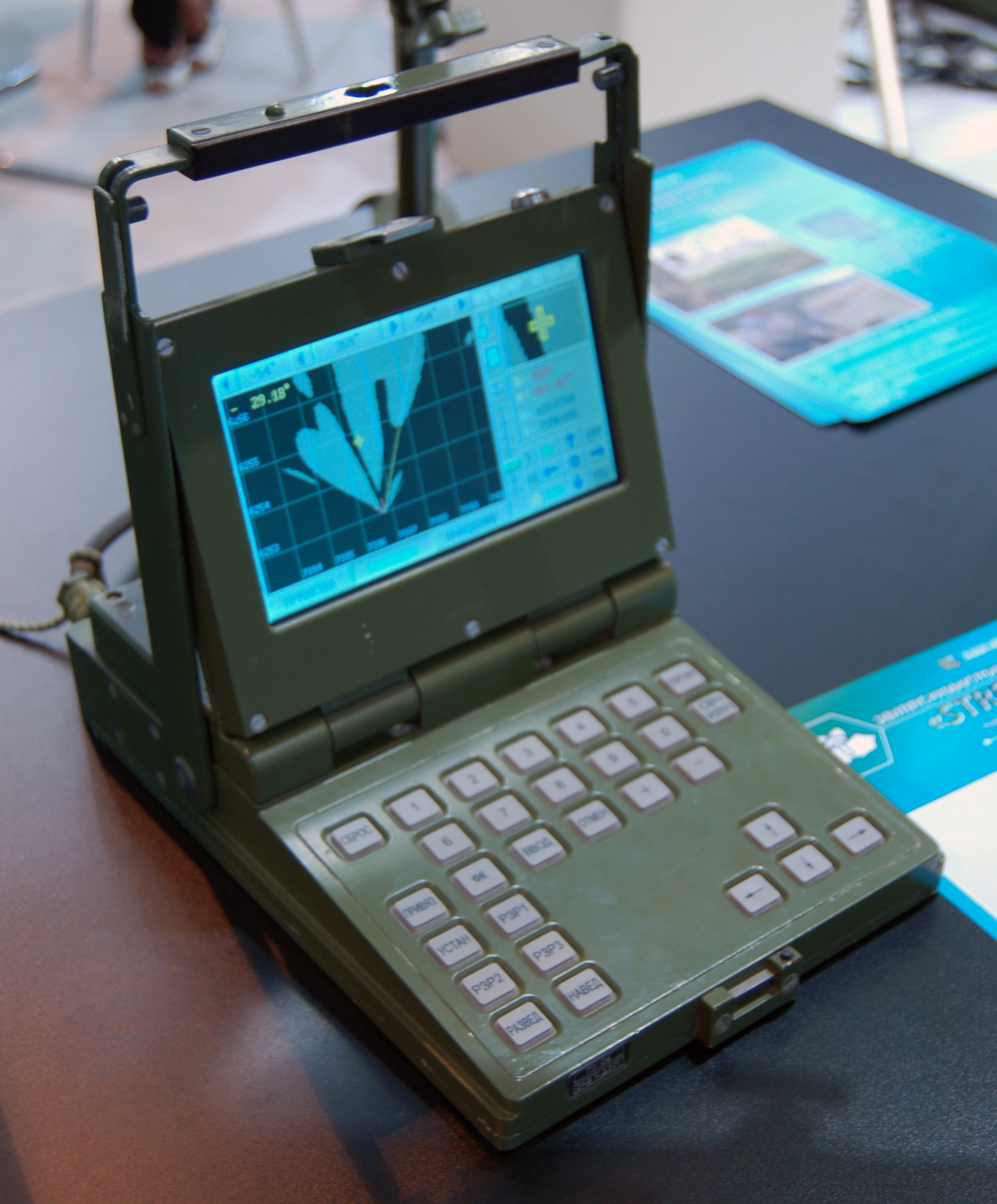 Терминал отображения информации переносной РЛС "Фара-ПВ". МАКС-2009